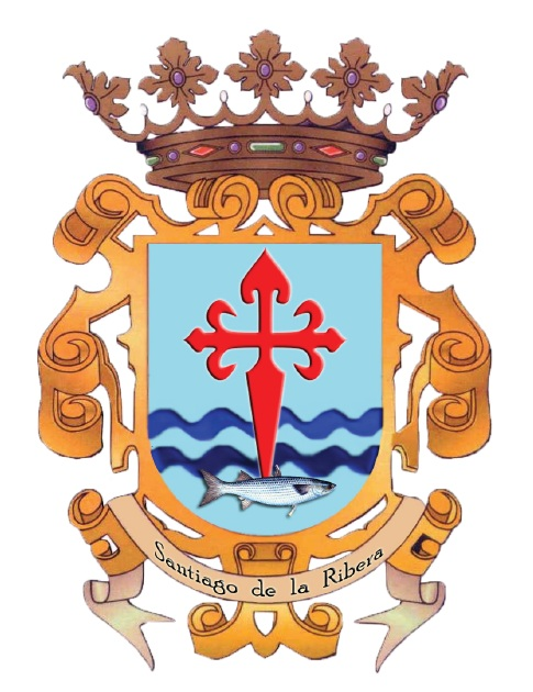 Escudo de Santiago de la Ribera, en el municipio de San Javier (Murcia, España)